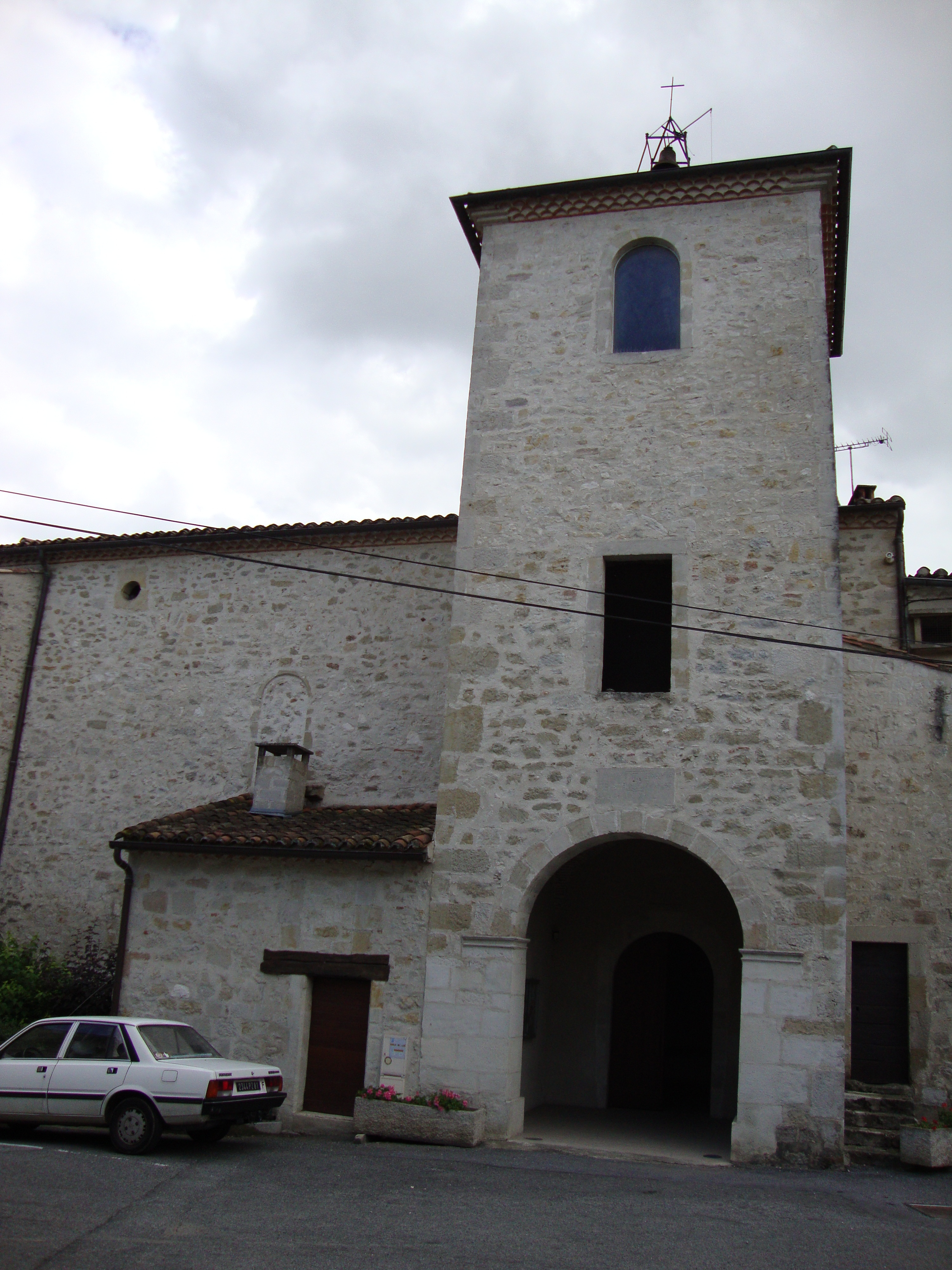 Saïx (Tarn, Fr) église